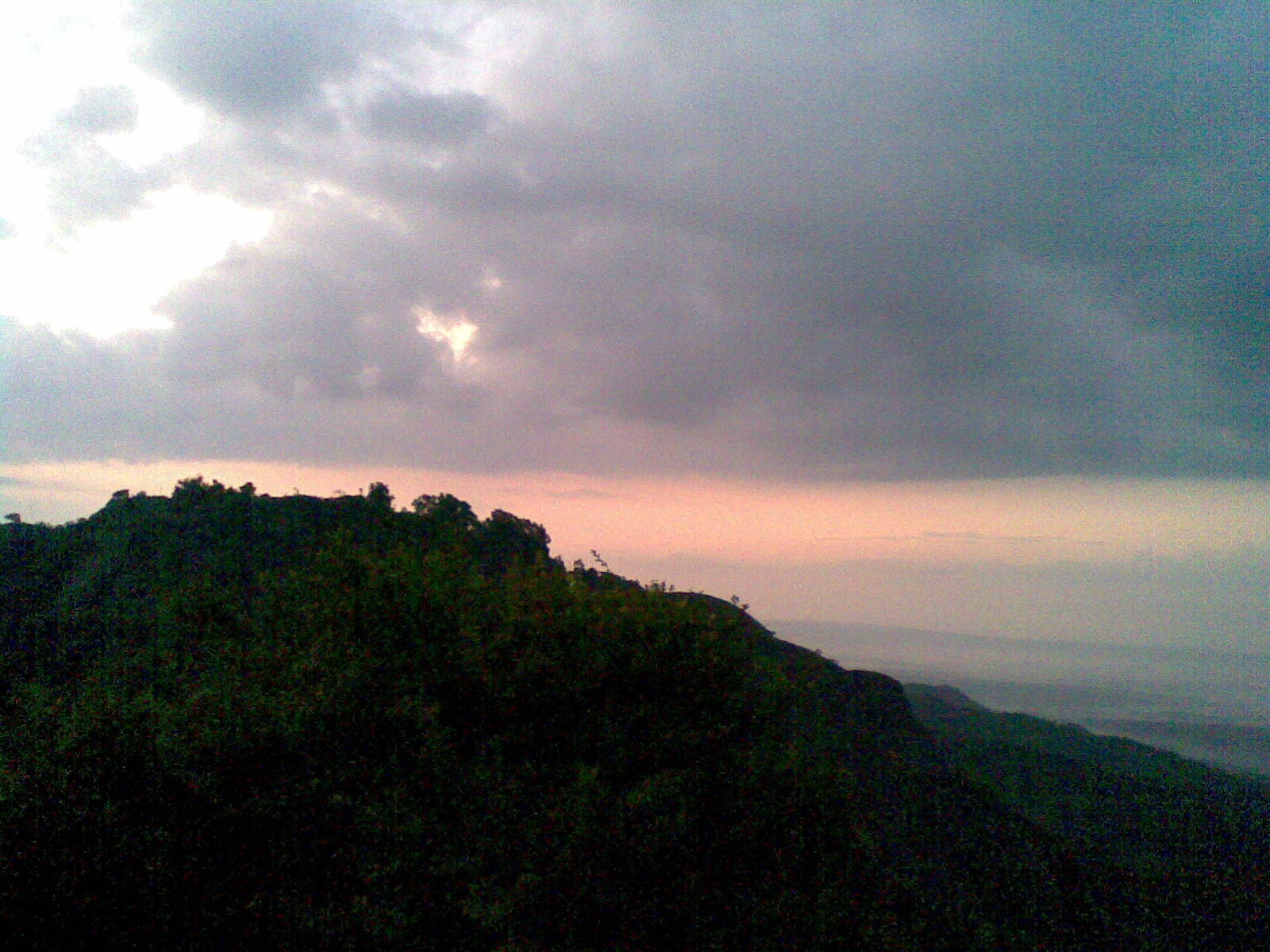 Keindahan matahari terbit